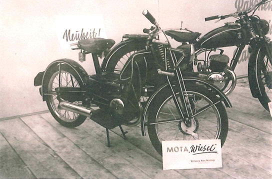 Ce véhicule nommé "Wiesel" a été fabriqué entre 1954-59 en Allemagne.